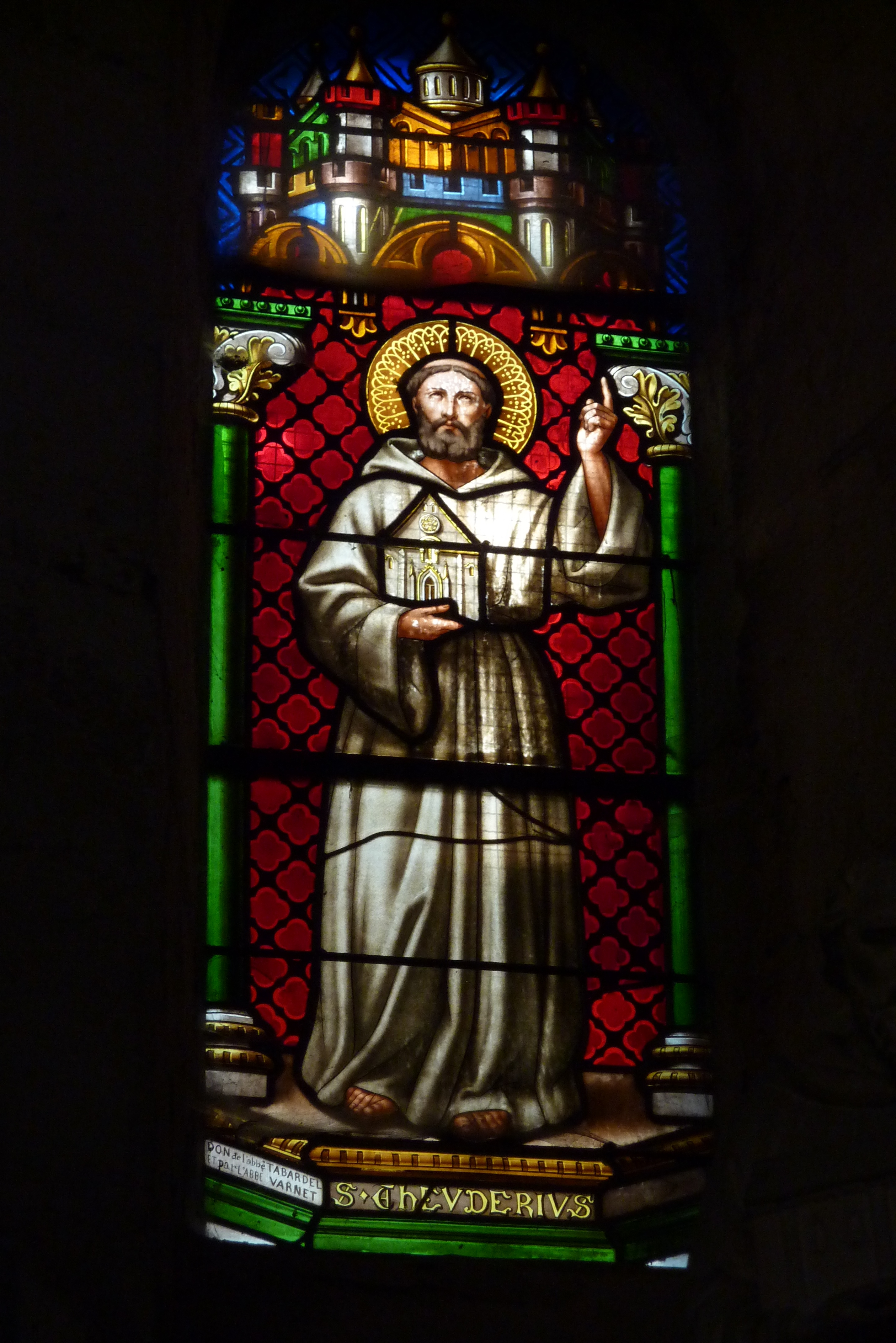 Bleiglasfenster in der Kirche Saint-Theudère in Saint-Chef, Darstellung: hl. Theuderius